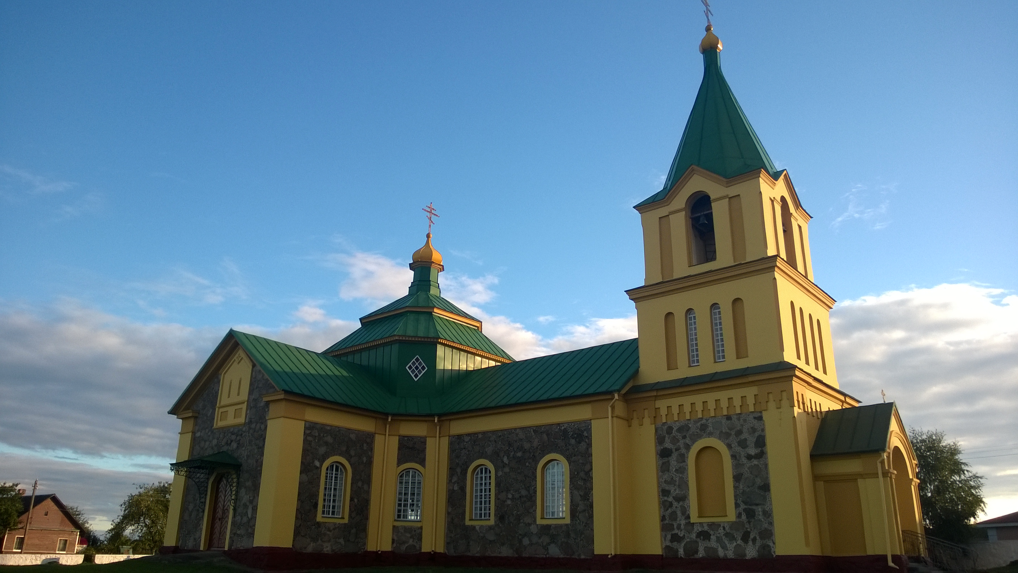 Astryna, Belarus